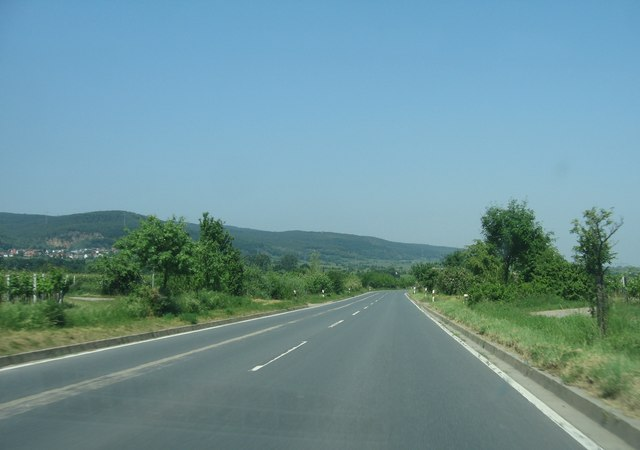 An der Eselshaut